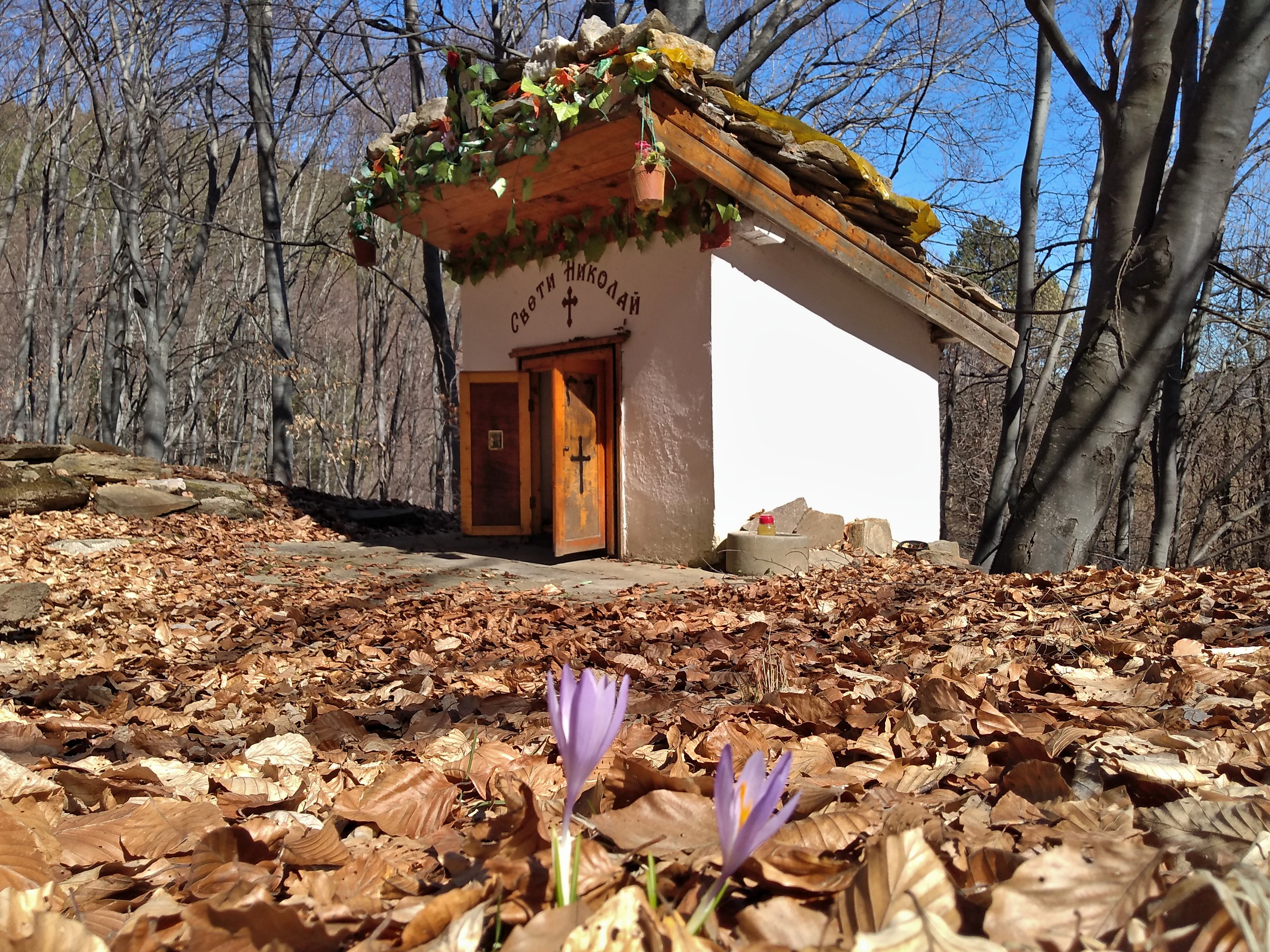 Параклисът през Март